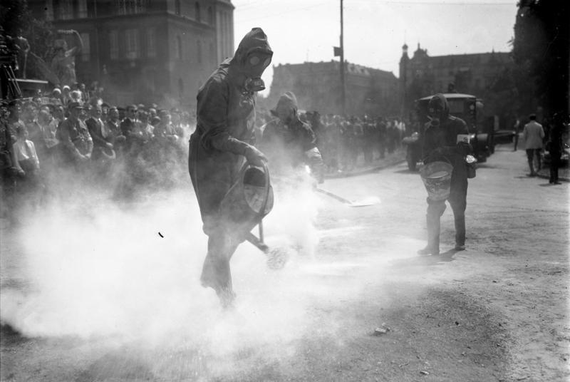 "Gas über Berlin" Die erste grosse Luftschutzübung unter Mitwirkung der Polizei, Sanitäter und Hilfsmannschaften, wurde in der Technischen Hochschule in Berlin abgehalten. Selbst der Tonfilmoperateur trug bei der Luftschutzübung während der Arbeit die Gasmaske.